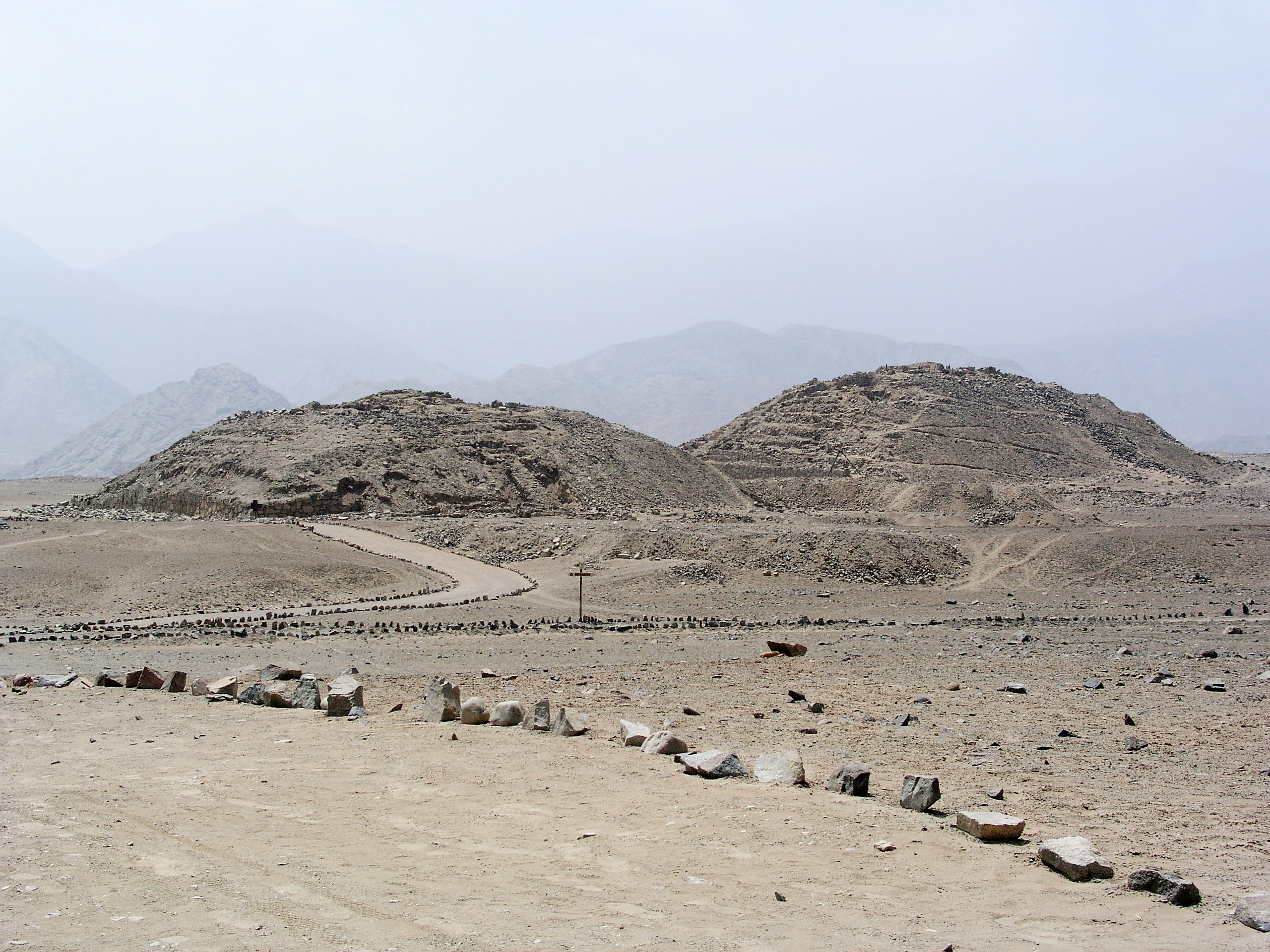 Pirámides en Caral, Valle de Supe, Region Lima, Peru